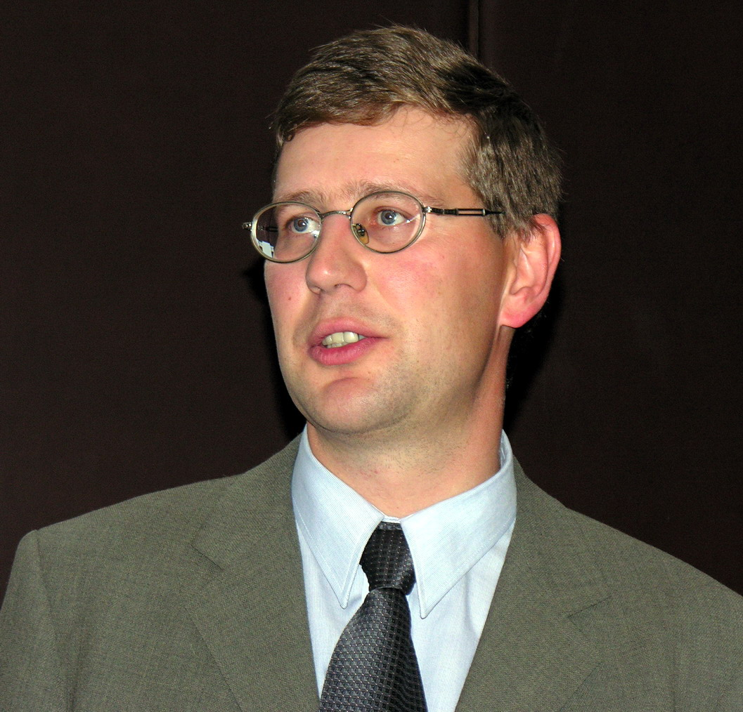 Dalius Dapkus